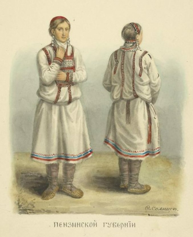 Солнцев Ф. Г. Пензенская губерния. «Одежды Русского государства».